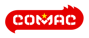 Logo der Comac